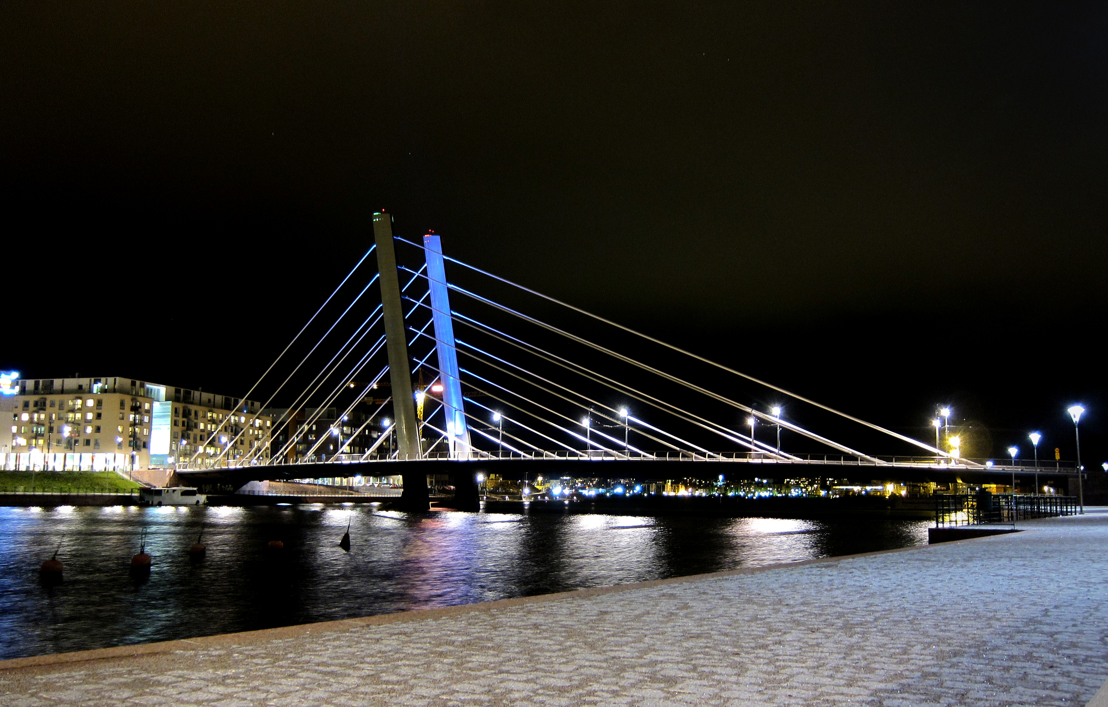 Crusellinsilta (ruots. Crusellbron) on Helsingin Länsisataman kaupunginosassa oleva silta, joka ylittää noin 125 metriä leveän Ruoholahti-nimisen merenlahden ja yhdistää Ruoholahden ja Jätkäsaaren osa-alueet.